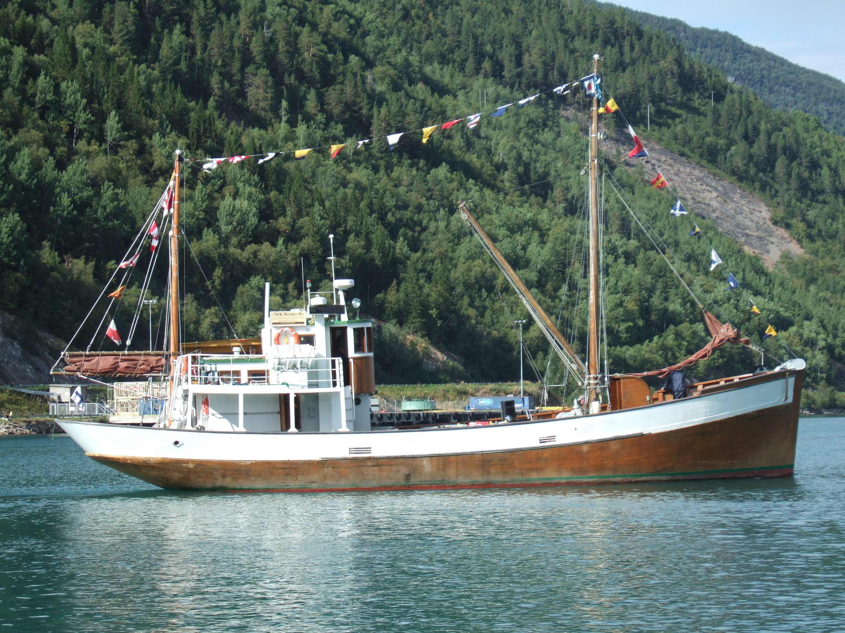 Skøyte med signalflagg i anledning Rognandagan 2014.